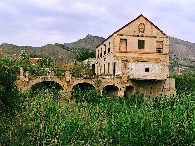 Orihuela. Molino de la ciudad